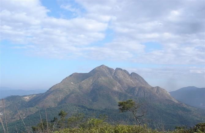 中文（中国大陆）: 作品拥有人“清清韩江水”授权“十万重山”发布。